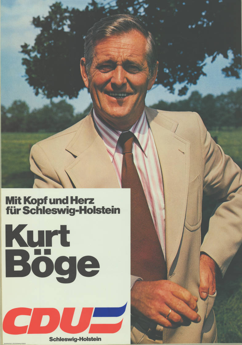 Mit Kopf und Herz für Schleswig-Holstein Kurt Böge CDU Schleswig-Holstein Abbildung: Foto Plakatart: Kandidaten-/Personenplakat mit Porträt Auftraggeber: Verantw.: CDU Schleswig-Holstein Objekt-Signatur: 10-012 : 412 Bestand: Landtagswahlplakate Schleswig-Holstein (10-012) GliederungBestand10-18: Landtagswahlplakate Schleswig-Holstein (10-012) » Landtagswahl am 29.4.1979 » Kandidatenplakate Lizenz: KAS/ACDP 10-012 : 412 CC-BY-SA 3.0 DE